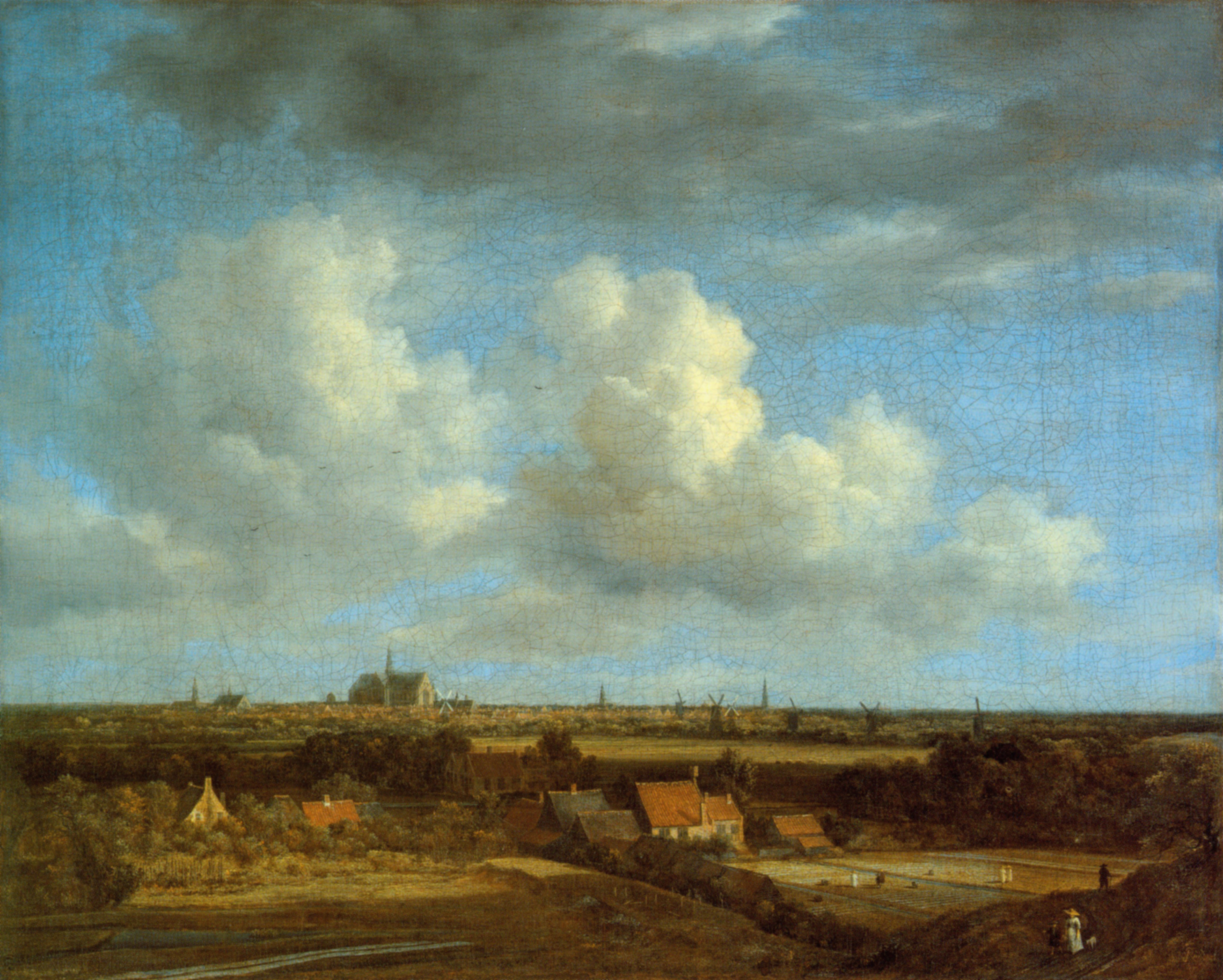 Haarlem von den Dünen im Nordwesten gesehen